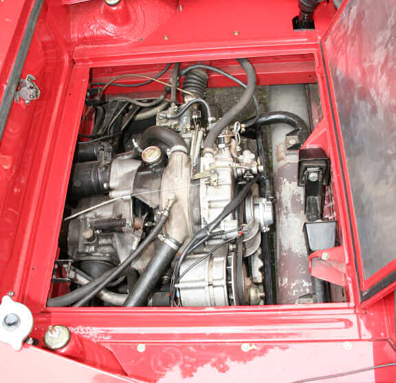 Blick in den Motorraum des NSU Wankel Spider, Oldtimertreffen in Bensberg Urheber: Ralf Pfeifer